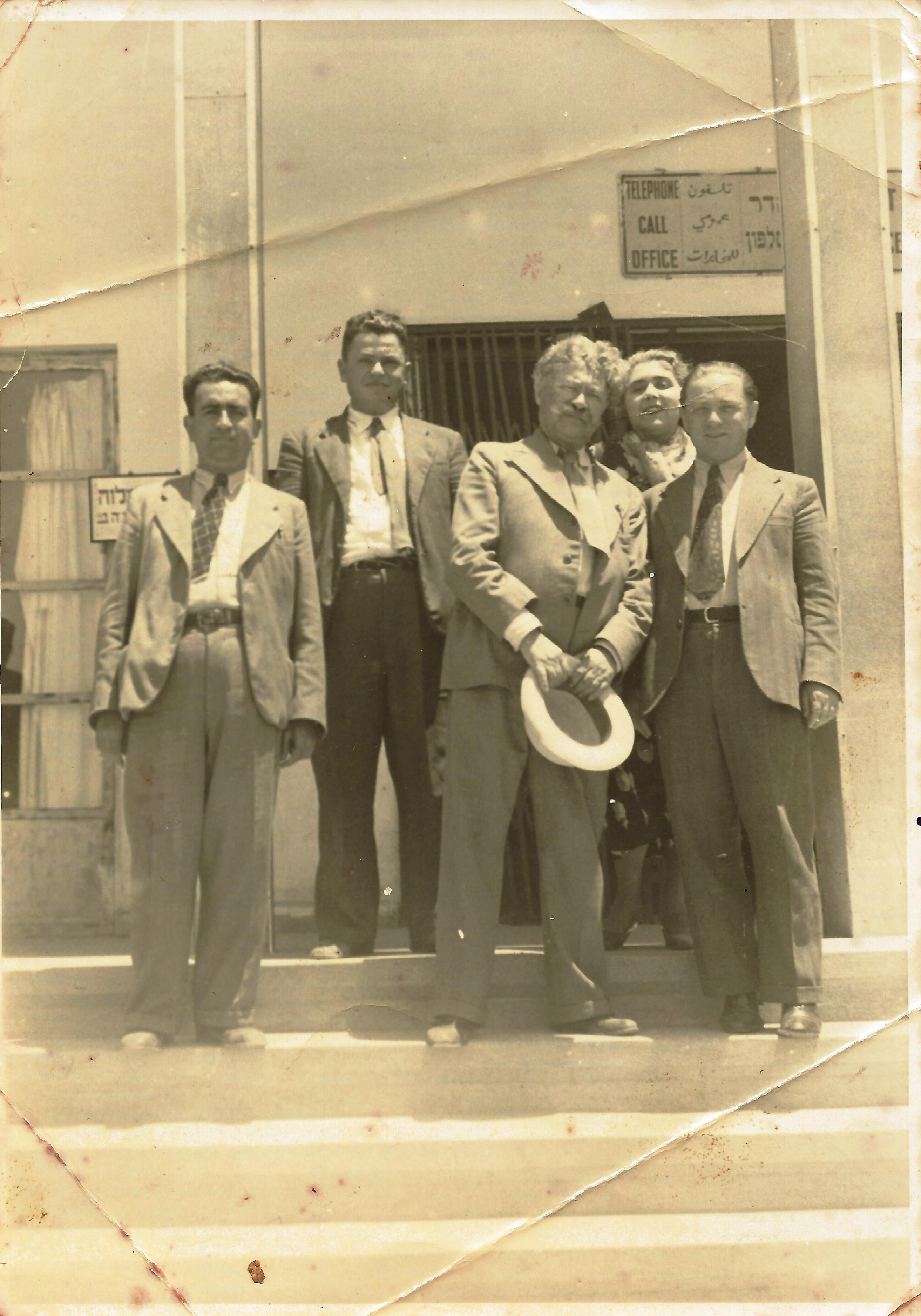 משה שקד בחברת המשורר שאול טשרניחובסקי ועובד בן עמי בשנת 1940